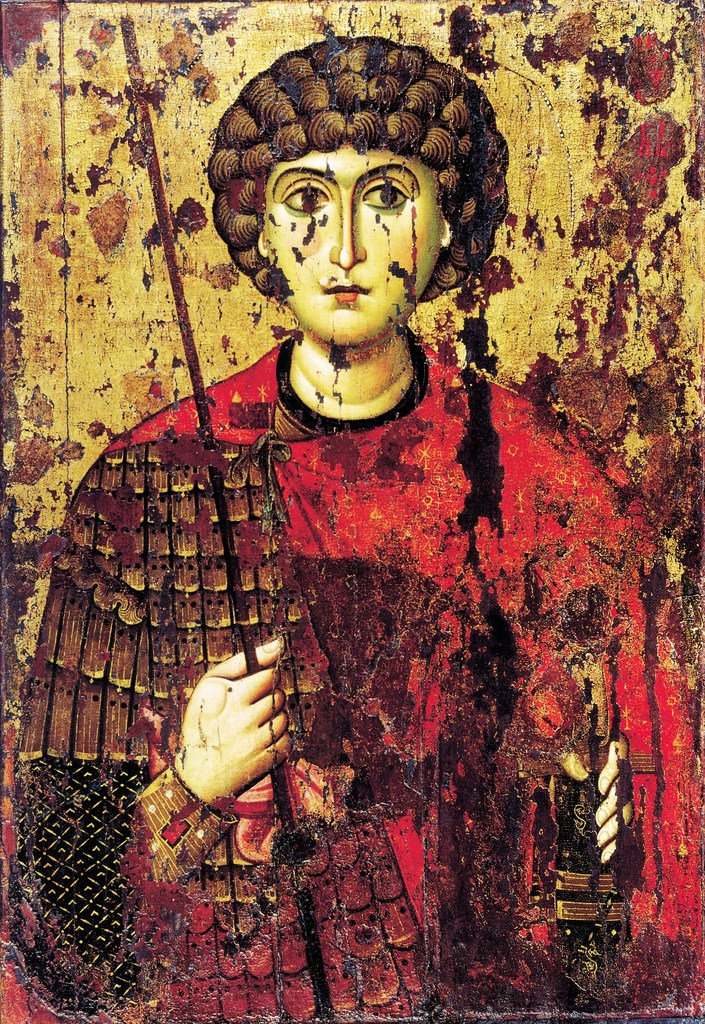 Святой Георгий. Конец 11-начало 12 века. Москва На лицевой стороне: Богоматерь Перивлепта. 174 х 122. Успенский собор Московского Кремля. Инв. № 966 соб/ж-135.